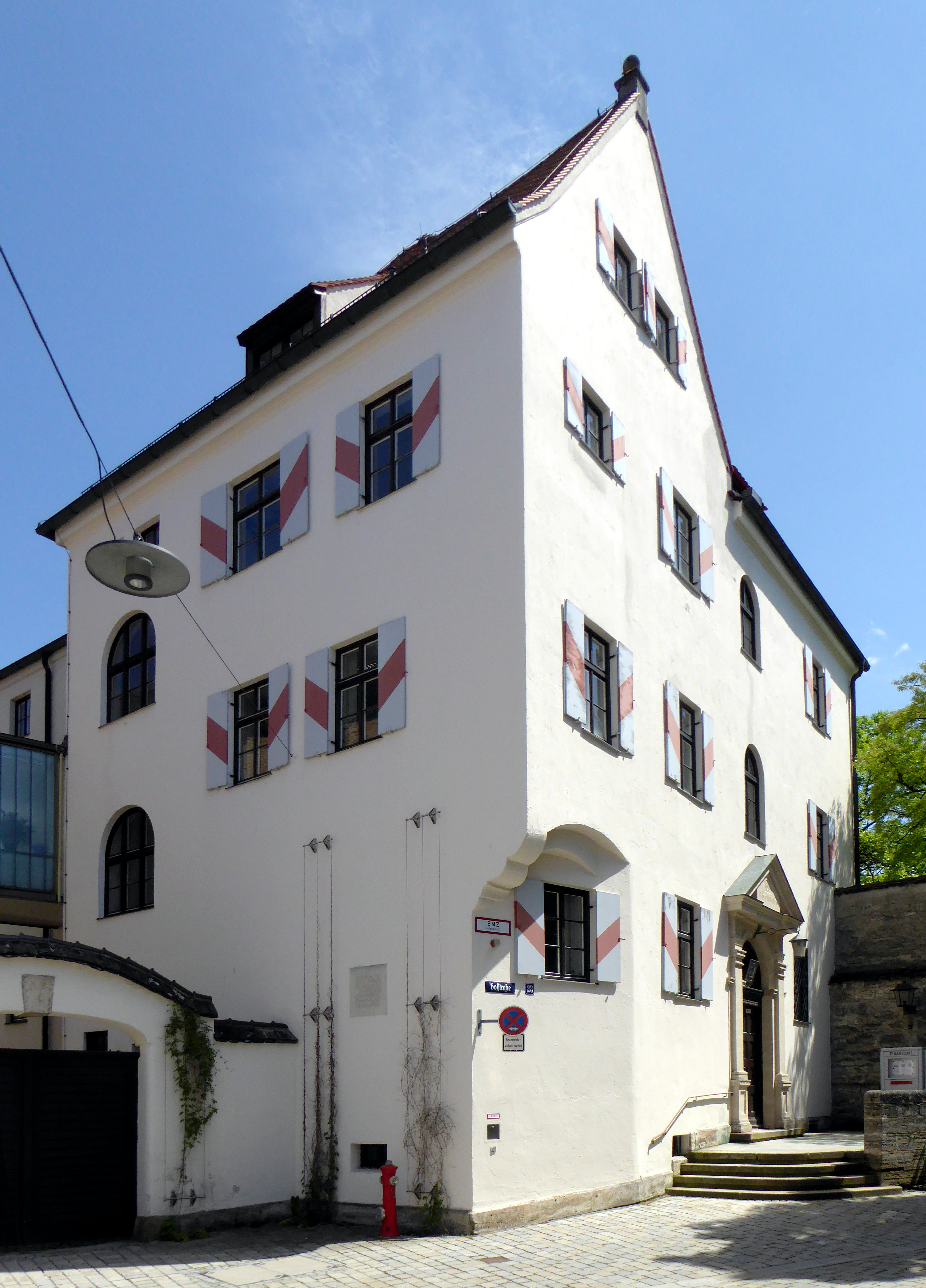 Weilheim in Oberbayern, Hofstraße 23 (Finanzamt).